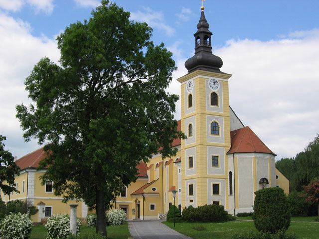 Pfarrkirche Weikendorf: Lizenz: GNU FDL Datum: de:2004 Ort: Weikendorf, Niederösterreich